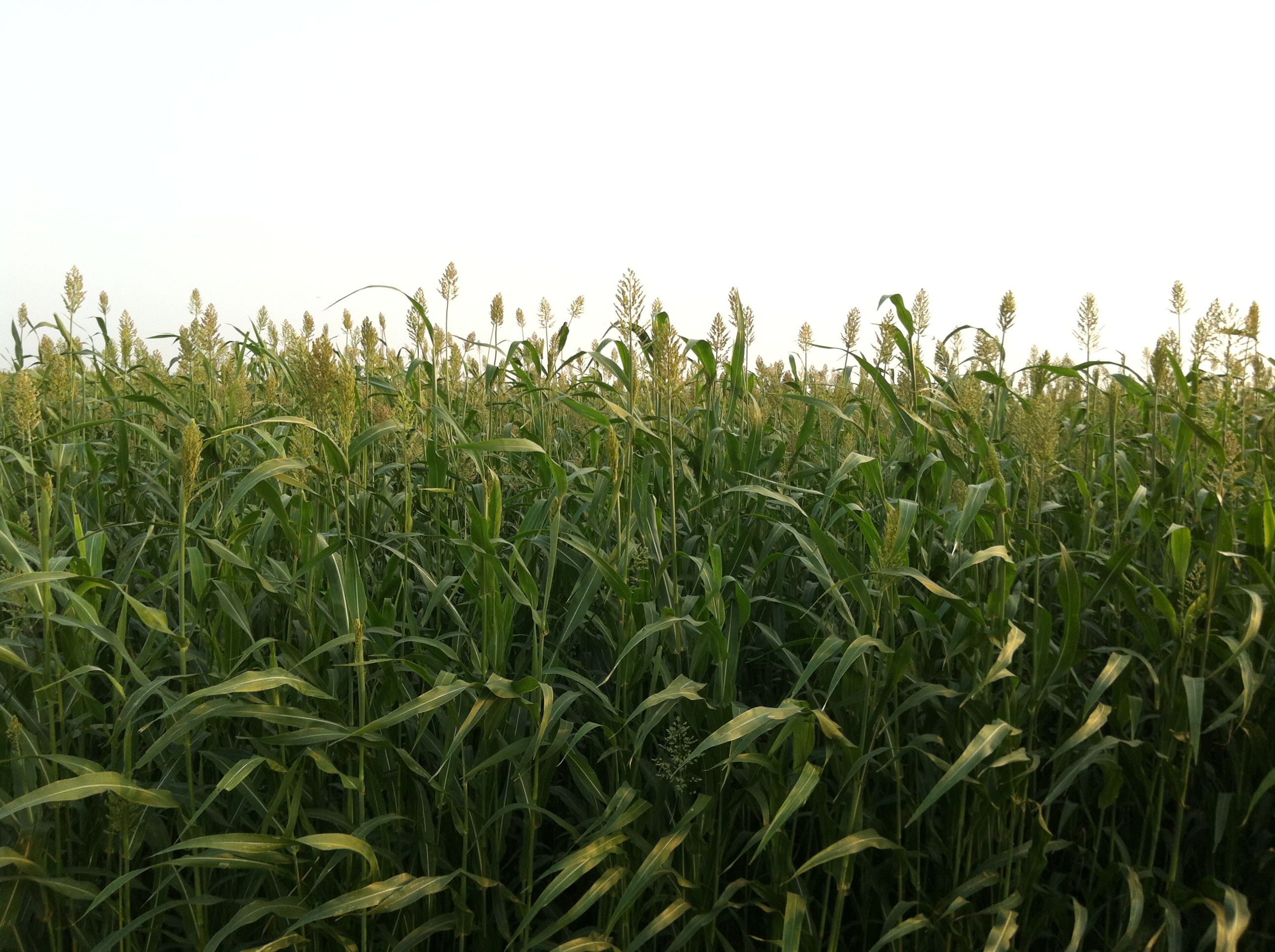 الذرة الرفيعة أحد أهم المحاصيل التي تشتهر بها منطقة جازان (لقطة من:الزاوية، محافظة صامطة) - السعودية